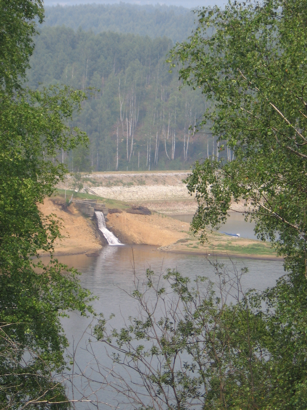 Kanalima voda dotiče u jezero